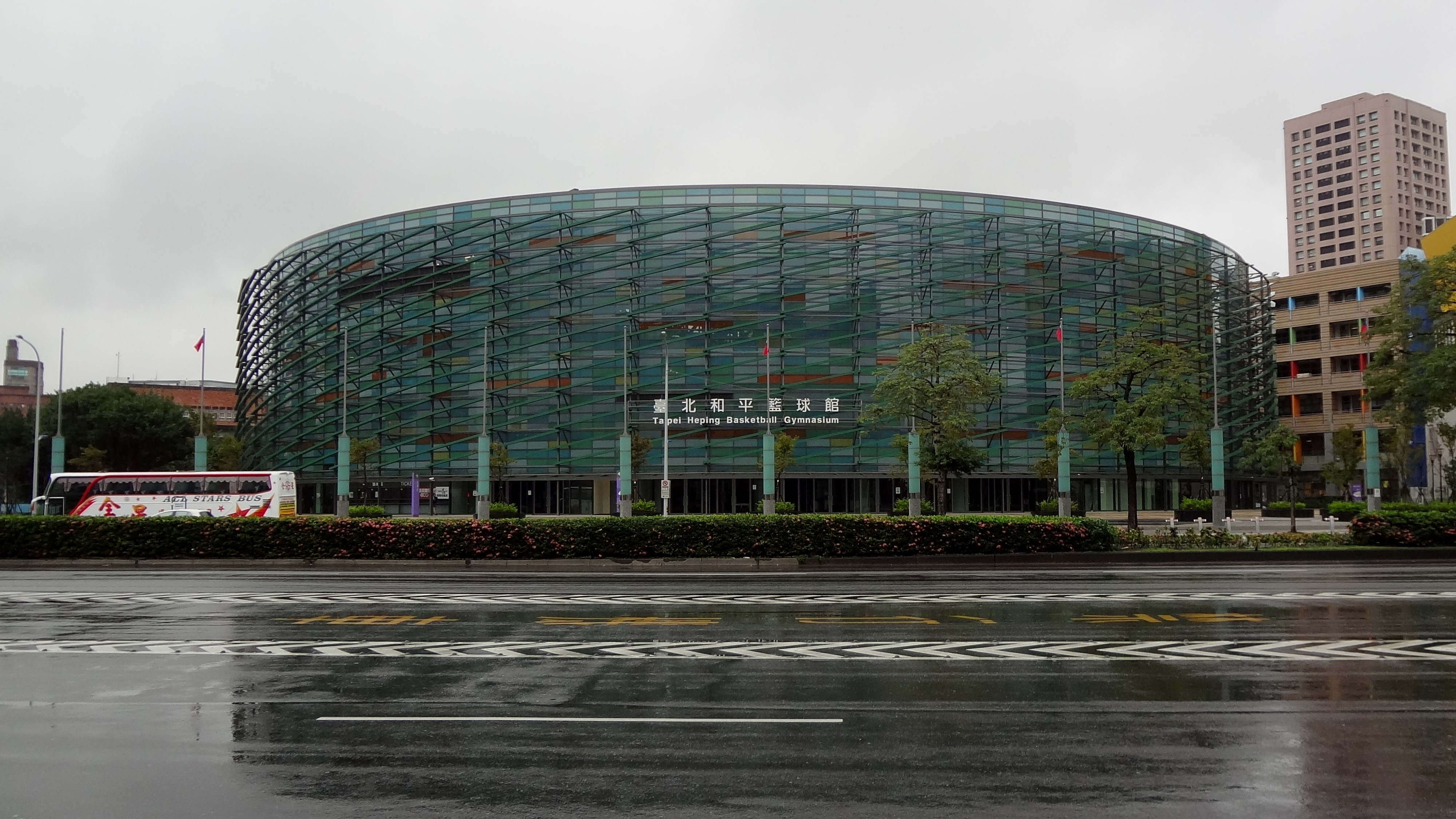 雨中的臺北和平籃球館。